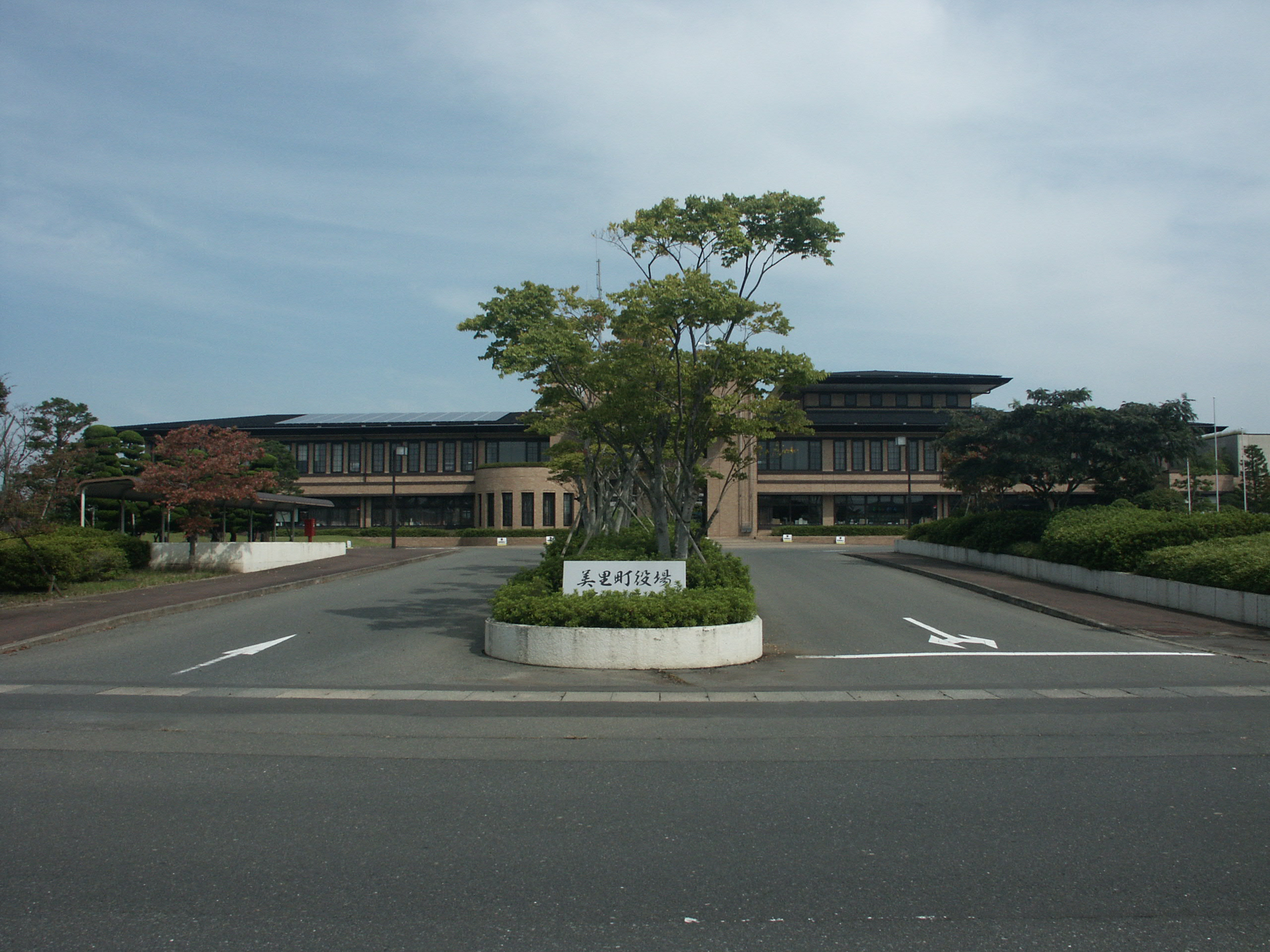 美里町役場南郷分庁庁舎